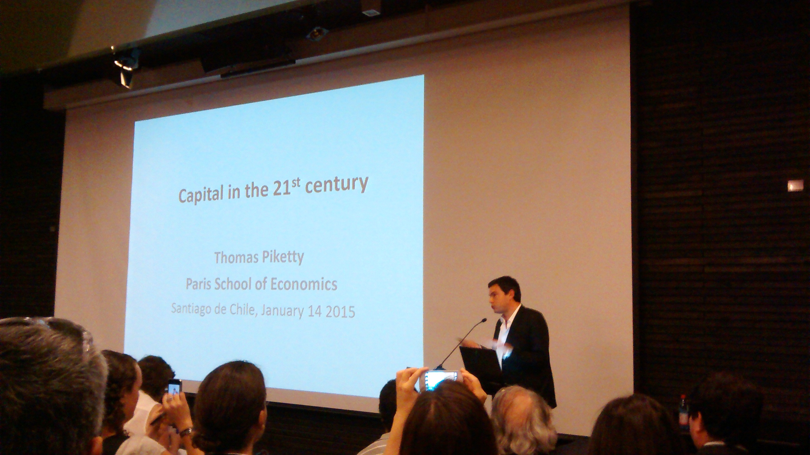 Thomas Piketty en la Universidad Diego Portales, 2015.